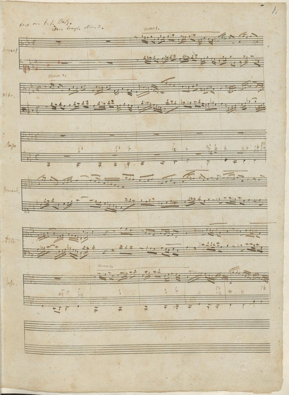 Robert Schumanns analytische Abschrift von J. S. Bachs Fuge c-Moll (BWV 847)